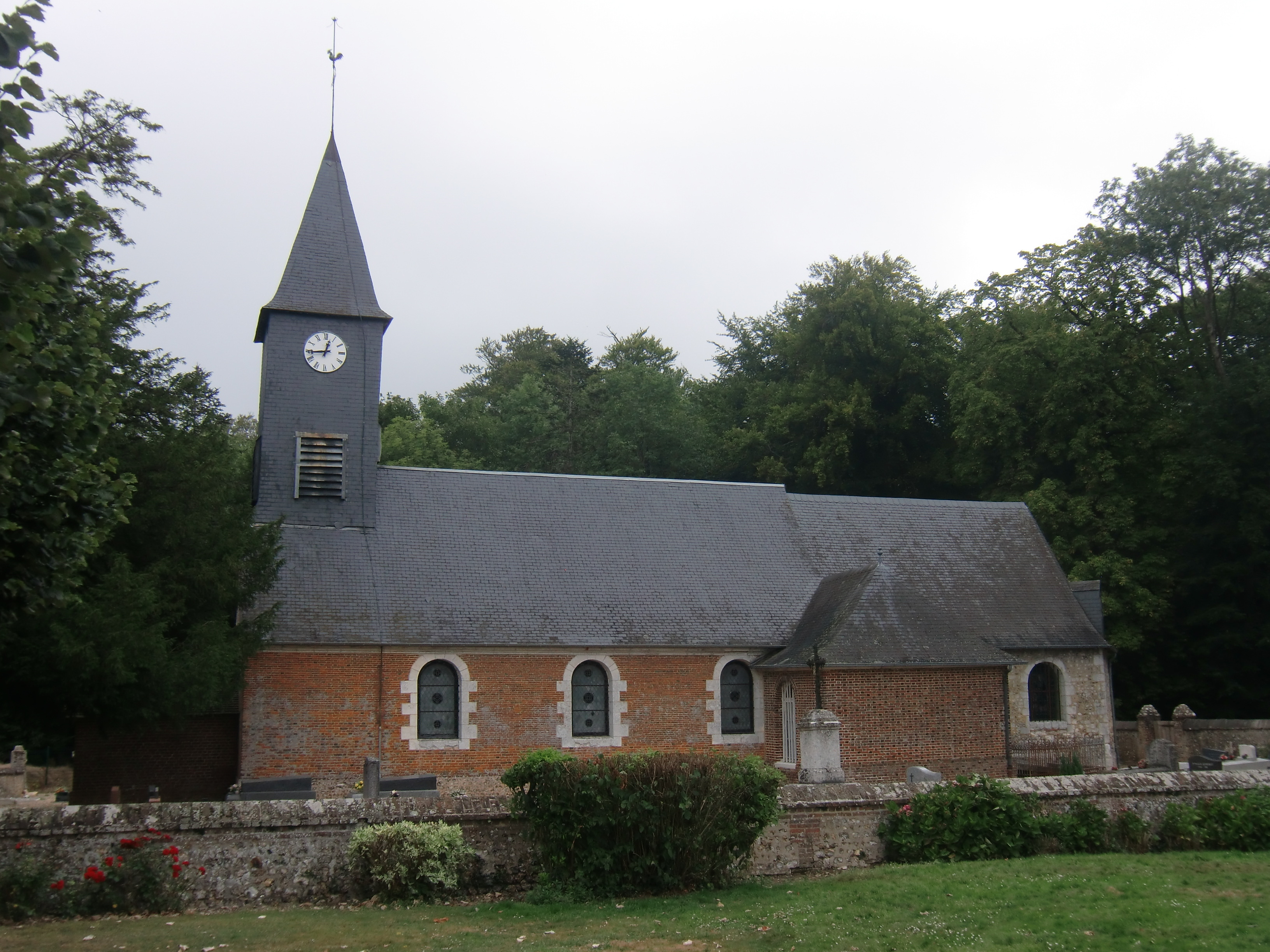 Eglise de Bosc-Bénard-Commin (Eure, Normandie, France)